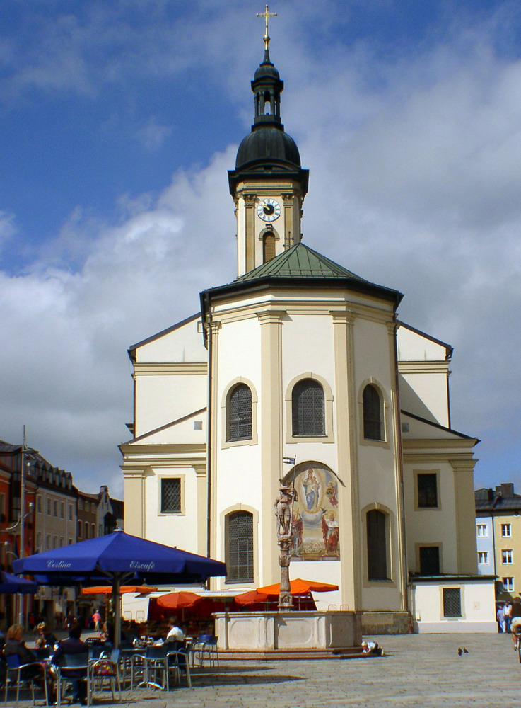 Pfarrkirche St. Oswald in Traunstein